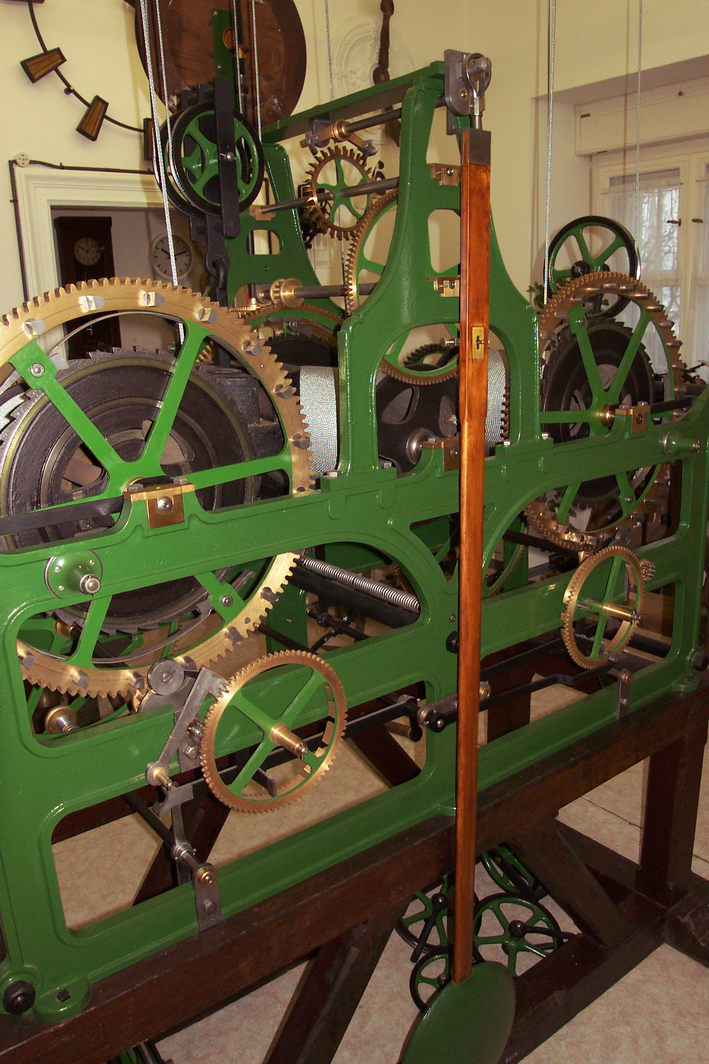 Uhrenmuseum Lichtenwalde im Schloss Lichtenwalde